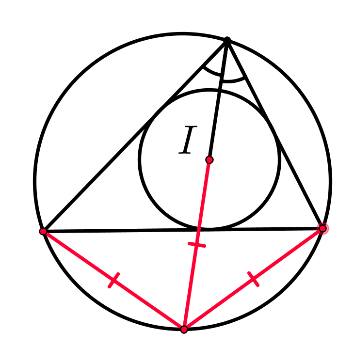 теорема о трилистнике